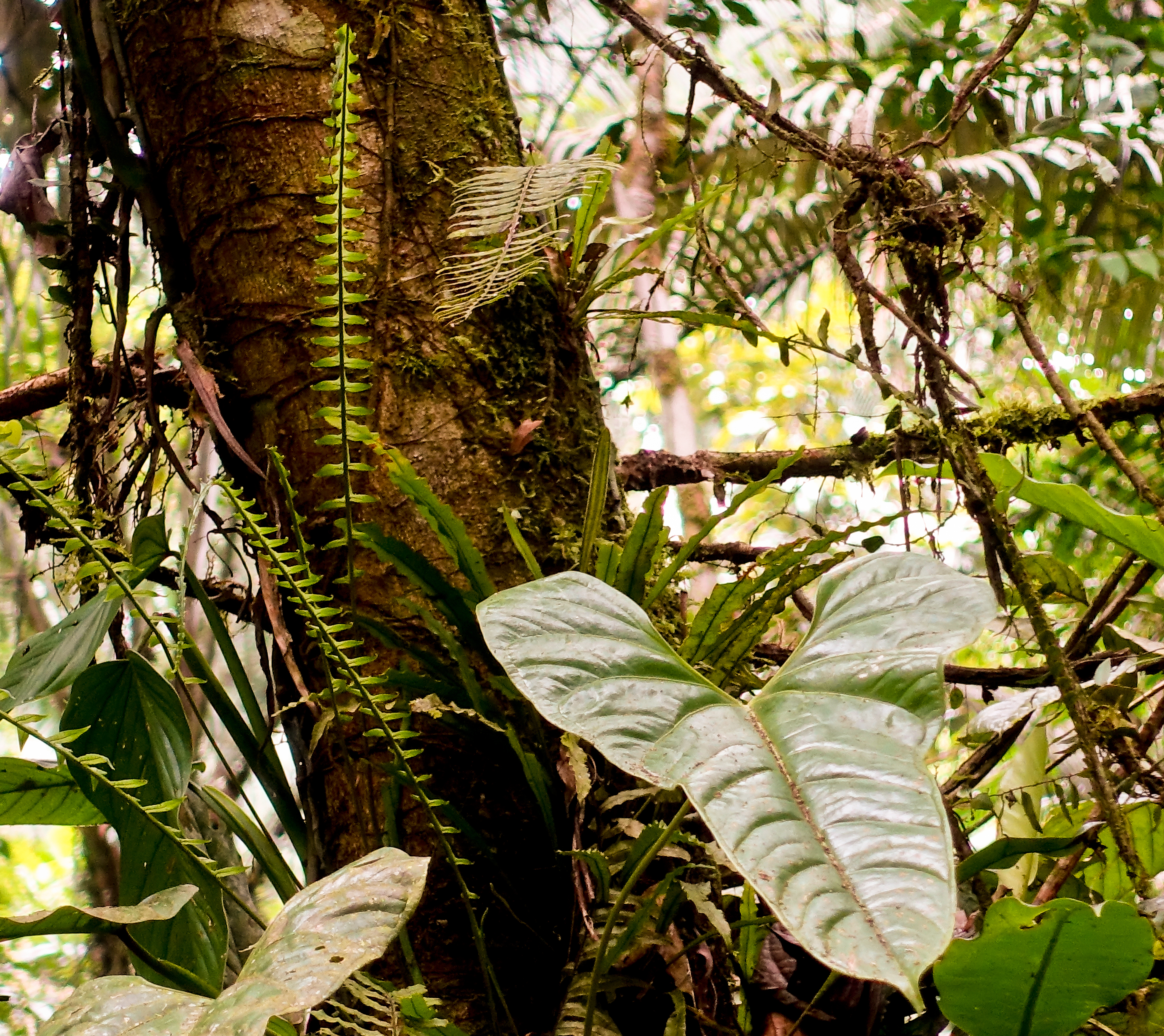 Diverse Blätter im tropischen Regenwald des Cuyabeno-Reservates, Ecuador